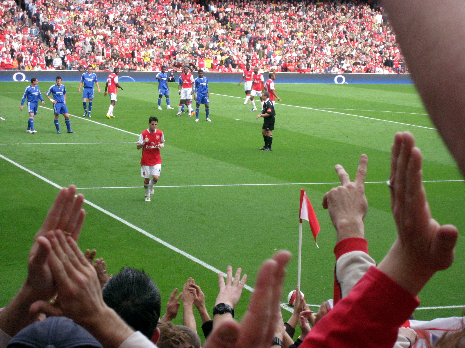 Cesc Fabregas